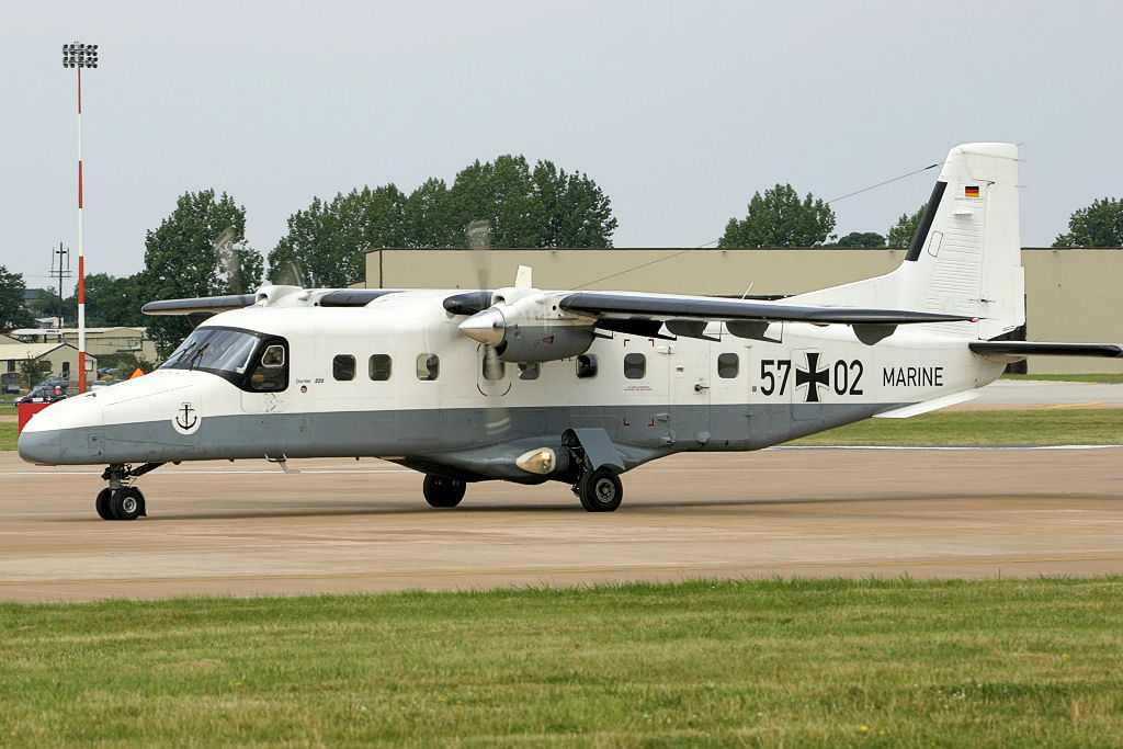 Dornier DO228 - RIAT 2005